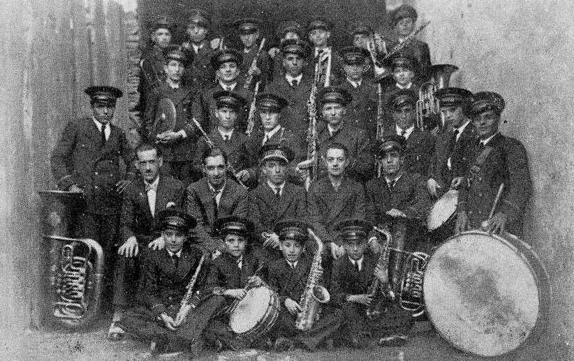 Banda municipal de Ordes coa súa directiva en 1932. Na segunda fila están Ezequiel Mato (tesoureiro), Antonio Concheiro Iglesias (presidente), Higinio Cambeses (director) e Manuel García Gerpe (secretario).